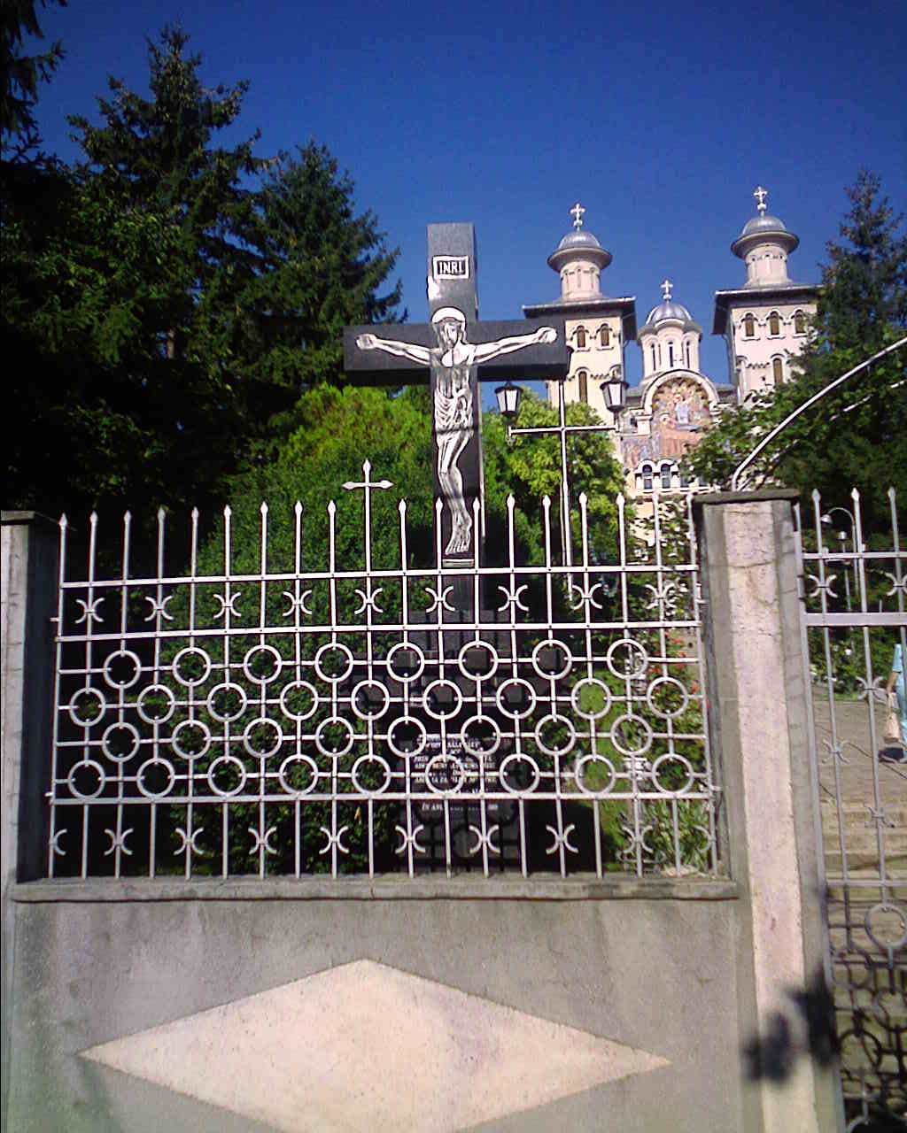 Răstignire în faţa Catedralei "Adormirea Maicii Domnului" din Zalău